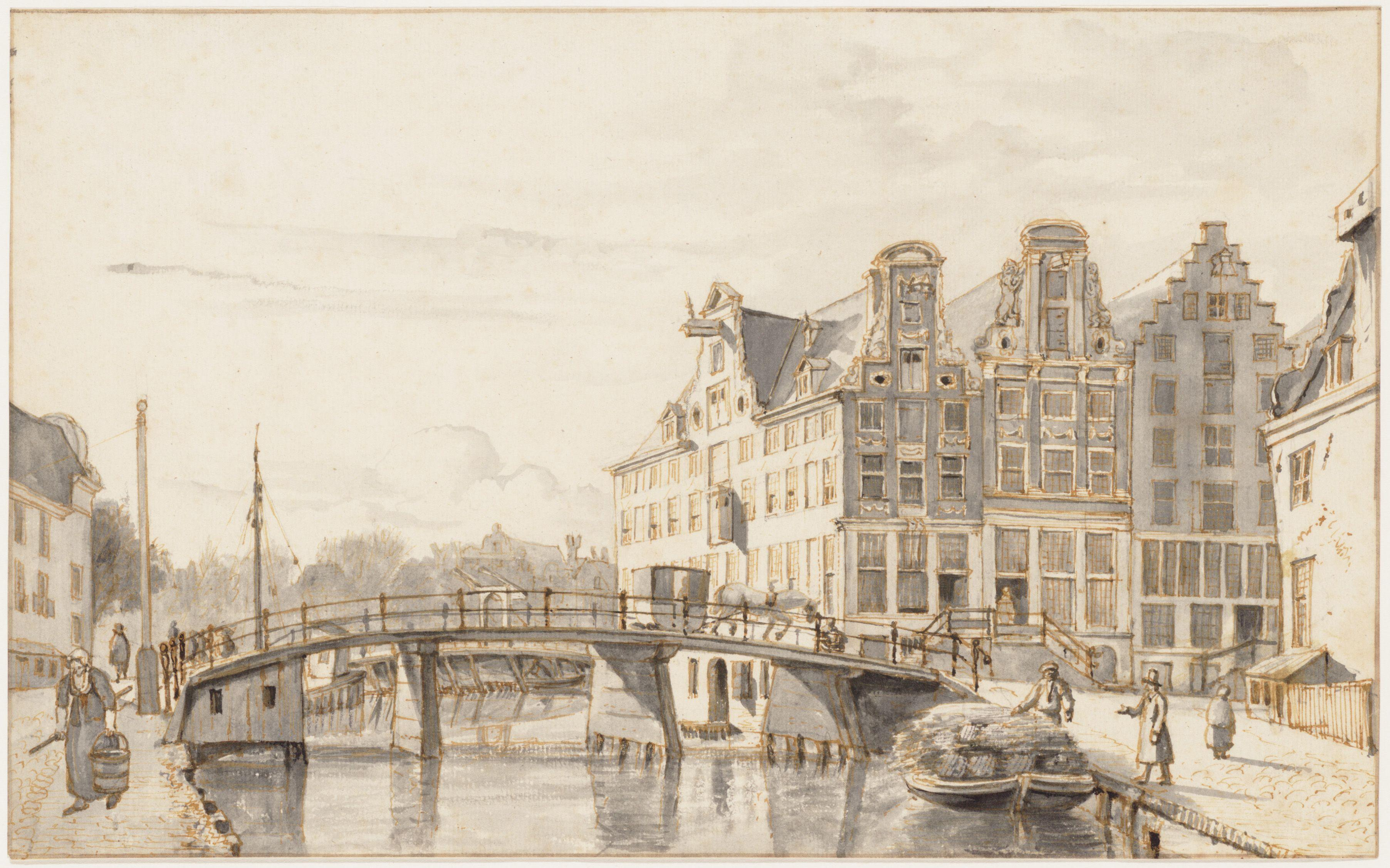 Beschrijving Leprozengracht Gezien in zuidwestelijke richting naar Zwanenburgerstraat. Documenttype tekening Vervaardiger Lamberts, Gerrit Collectie Collectie Koninklijk Oudheidkundig Genootschap Datering 1830 Geografische naam Leprozengracht Inventarissen Afbeeldingsbestand KOG-AA-2-16-293A